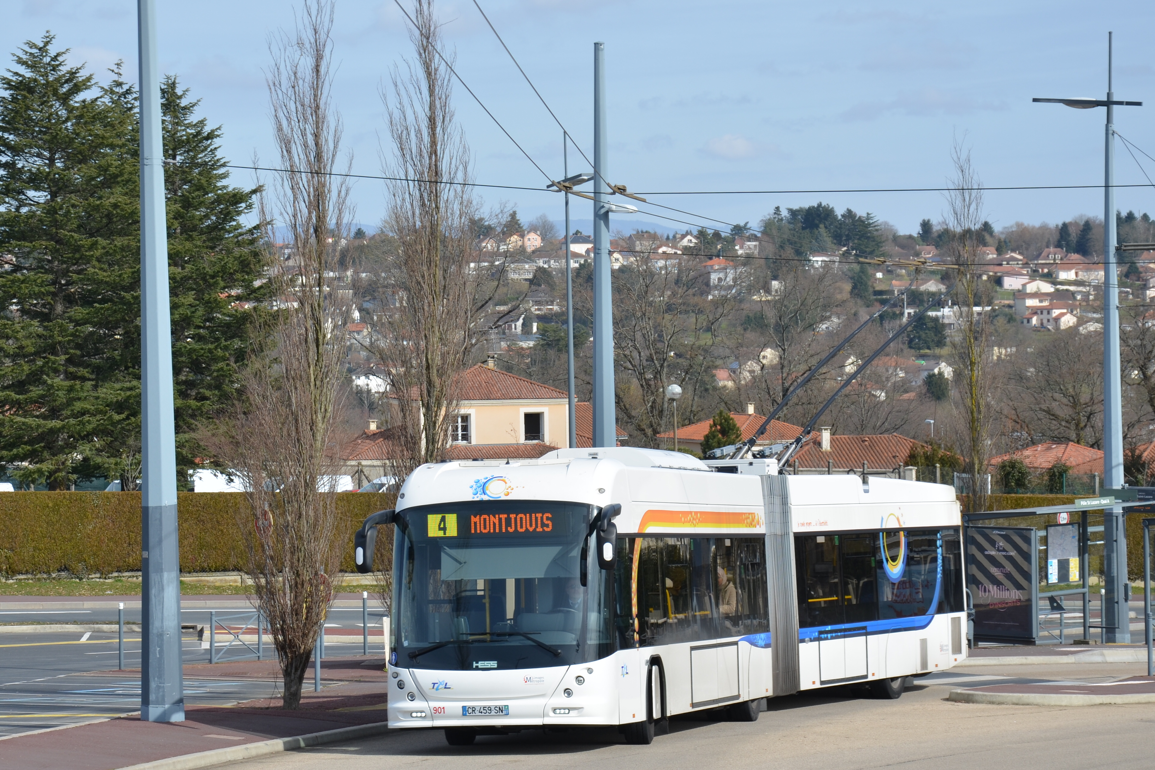 Hess Swisstrolley4 n°901 sur la ligne 4 du réseau TCL de Limoges, quittant le Pôle Saint-Lazare.